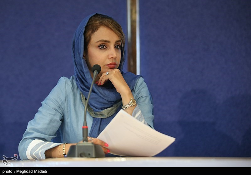 Shabnam Gholikhani